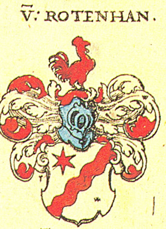 Wappen der Fränkischen Adelsfamilie Rotenhan